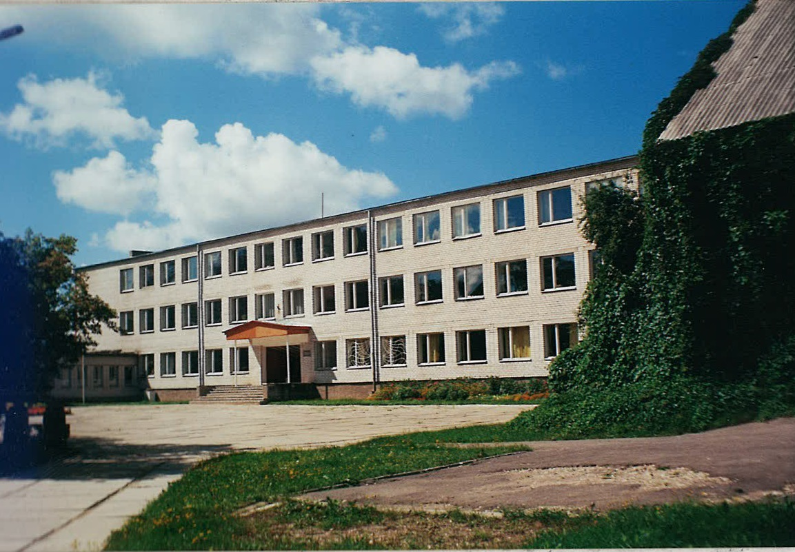 2 attēls